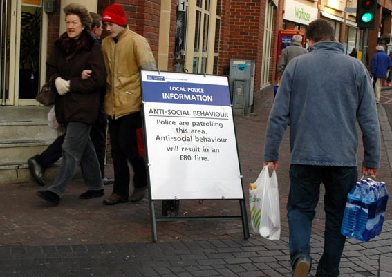 ASBO